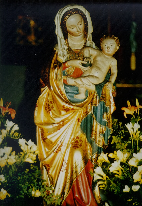 Die Skulptur befand sich bis zum 26.11.1985, als sie gestohlen wurde, in der Heilig-Kreuz-Kirche in Worms-Horchheim. Seither verschollen.